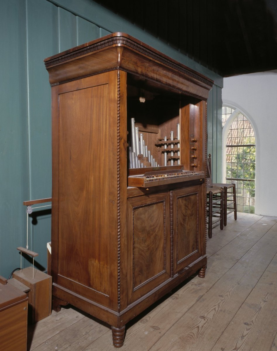 Gasthuiskapel verplaatst naar het Zuiderzeemuseum in Enkhuizen: Interieur, aanzicht secretaire-orgel van Hermanus Knipscheer (opmerking: Gefotografeerd voor Het Historische Orgel in Nederland 1850-1858) Afkomstig van begraafplaats Enkhuizen